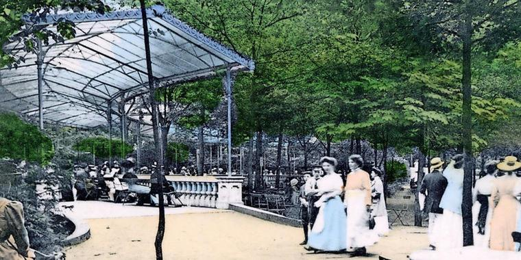 Konzertpavillon im Waldpark Weißer Hirsch, Dresden, 1904